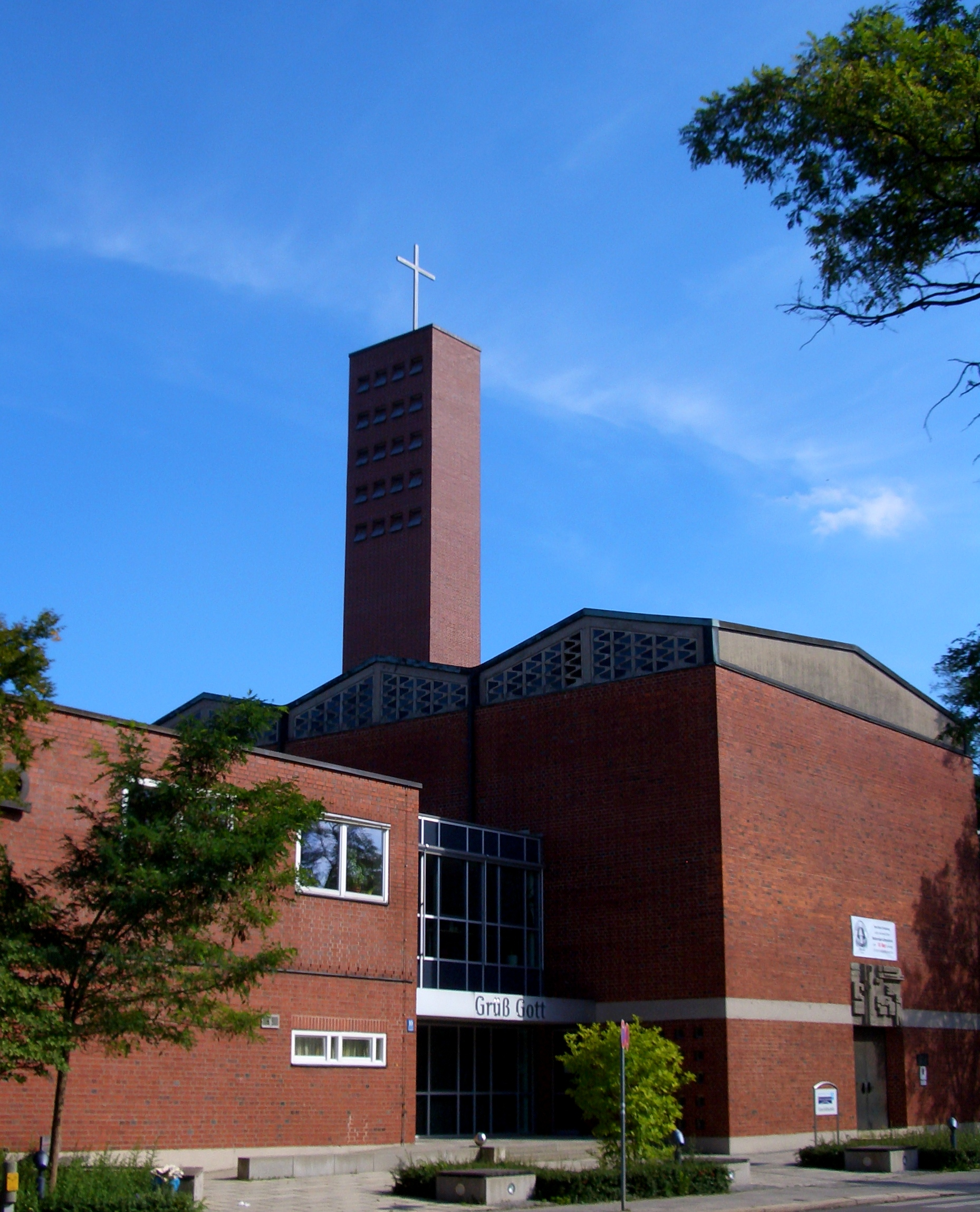 Evangeliumskirche Muenchen-Hasenbergl